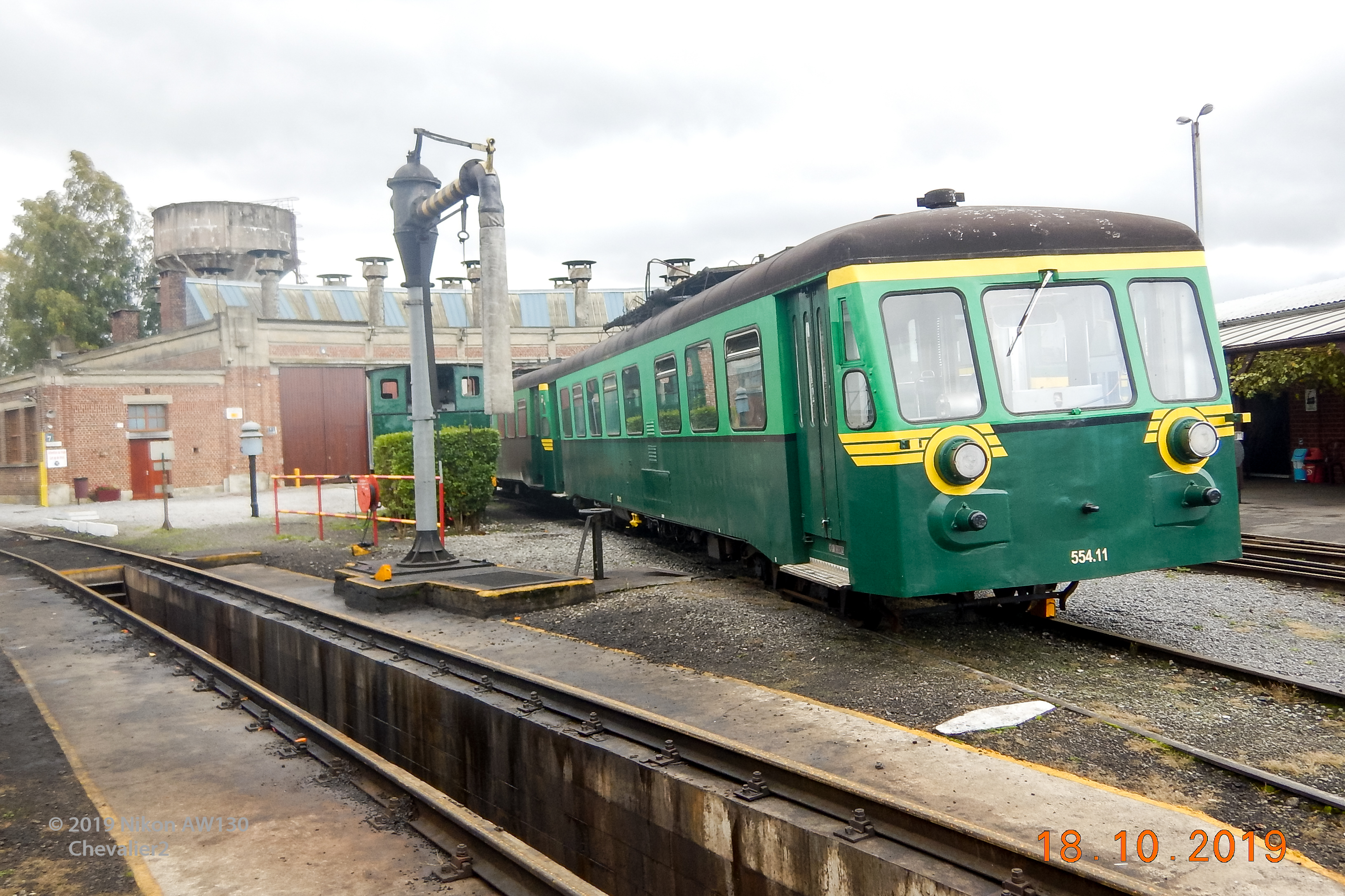 2019-Autorail 554.11 CF3V